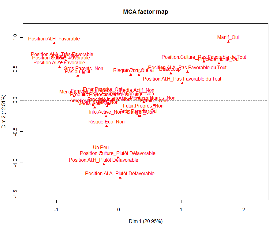 ACM contribution des modalités aux deux premiers axes, d'après une étude sur la perception des ogm menée par Agrocampus Université de Rennes auprès de 135 personnes en 2008